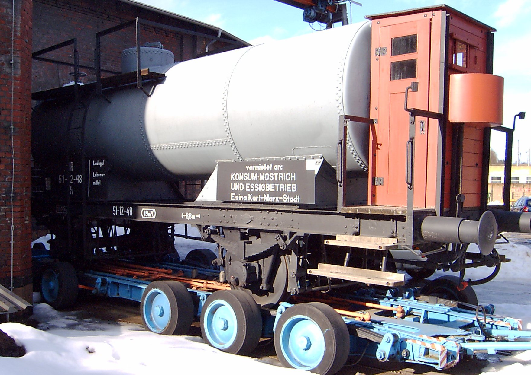 Sächsisches Eisenbahnmuseum Chemnitz, Culemeyer